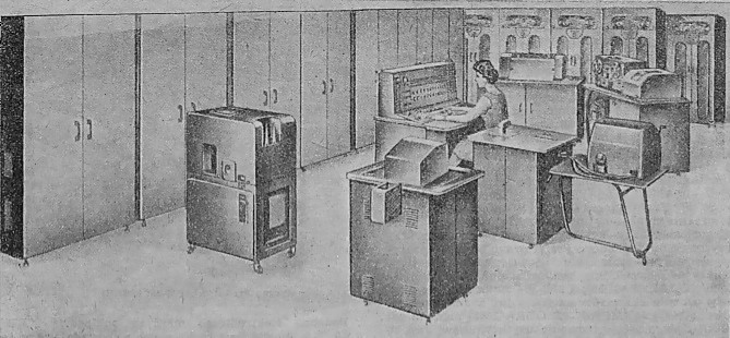 Komputer Mińsk-22